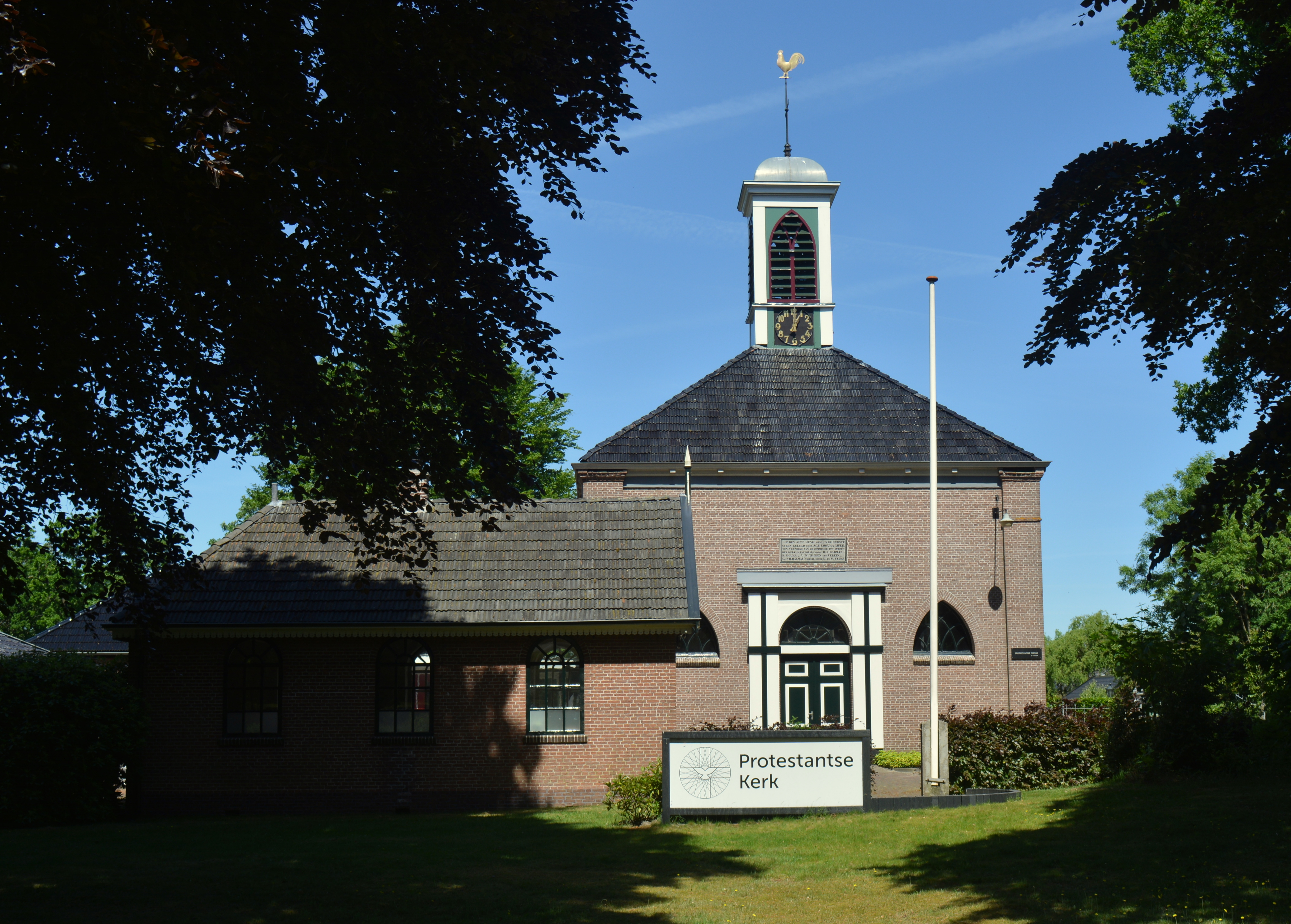 Noardburgum, prot. kerk